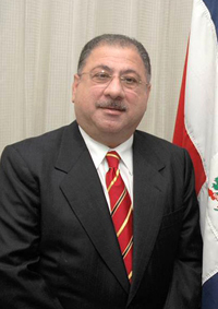 Ministro de Interior y Policía Ministerio de Interior y Policía de la República Dominicana